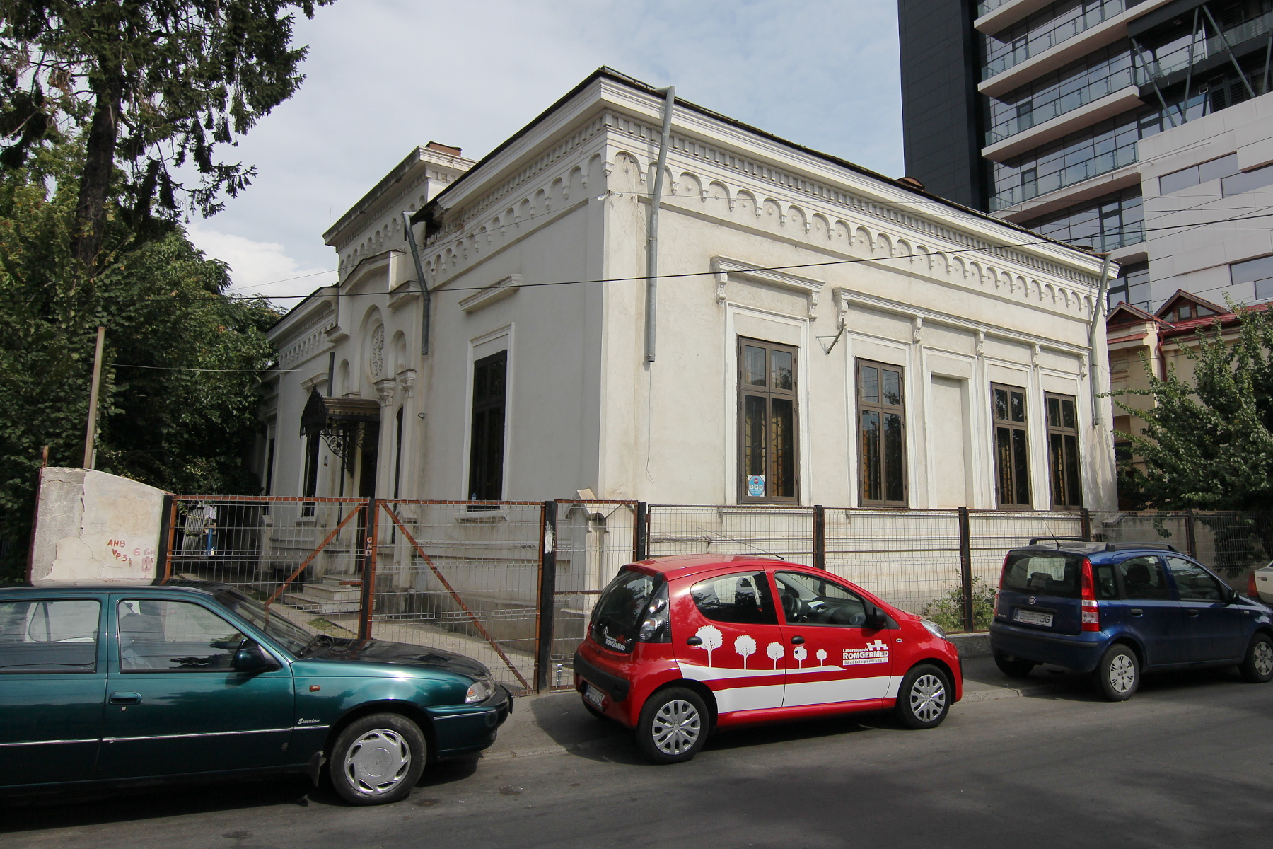 Casă pe Str Robescu